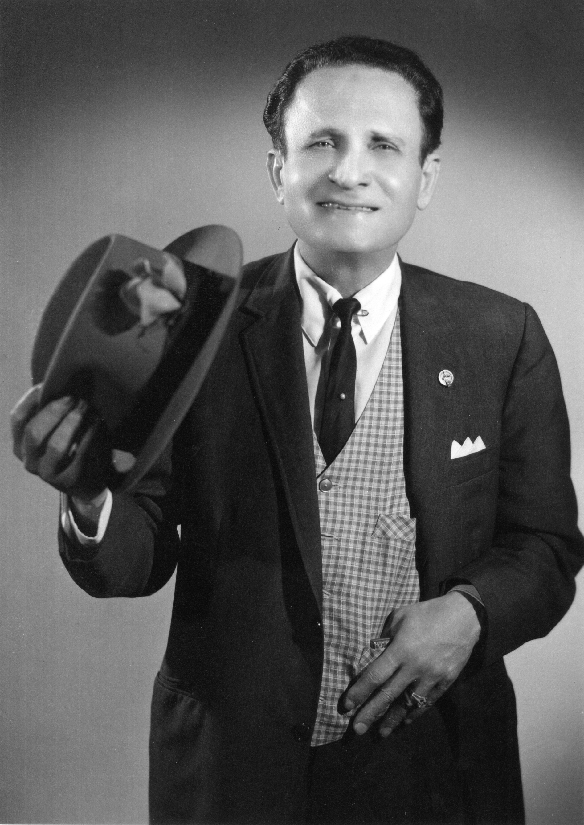 Foto 1960